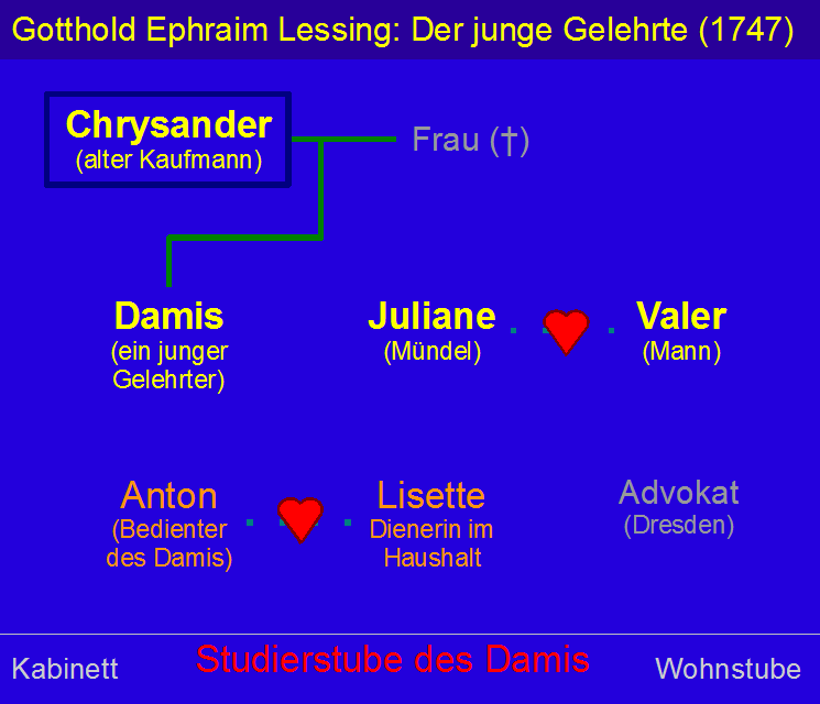 Gotthold Ephraim Lessing: Der junge Gelehrte (Personenübersicht)